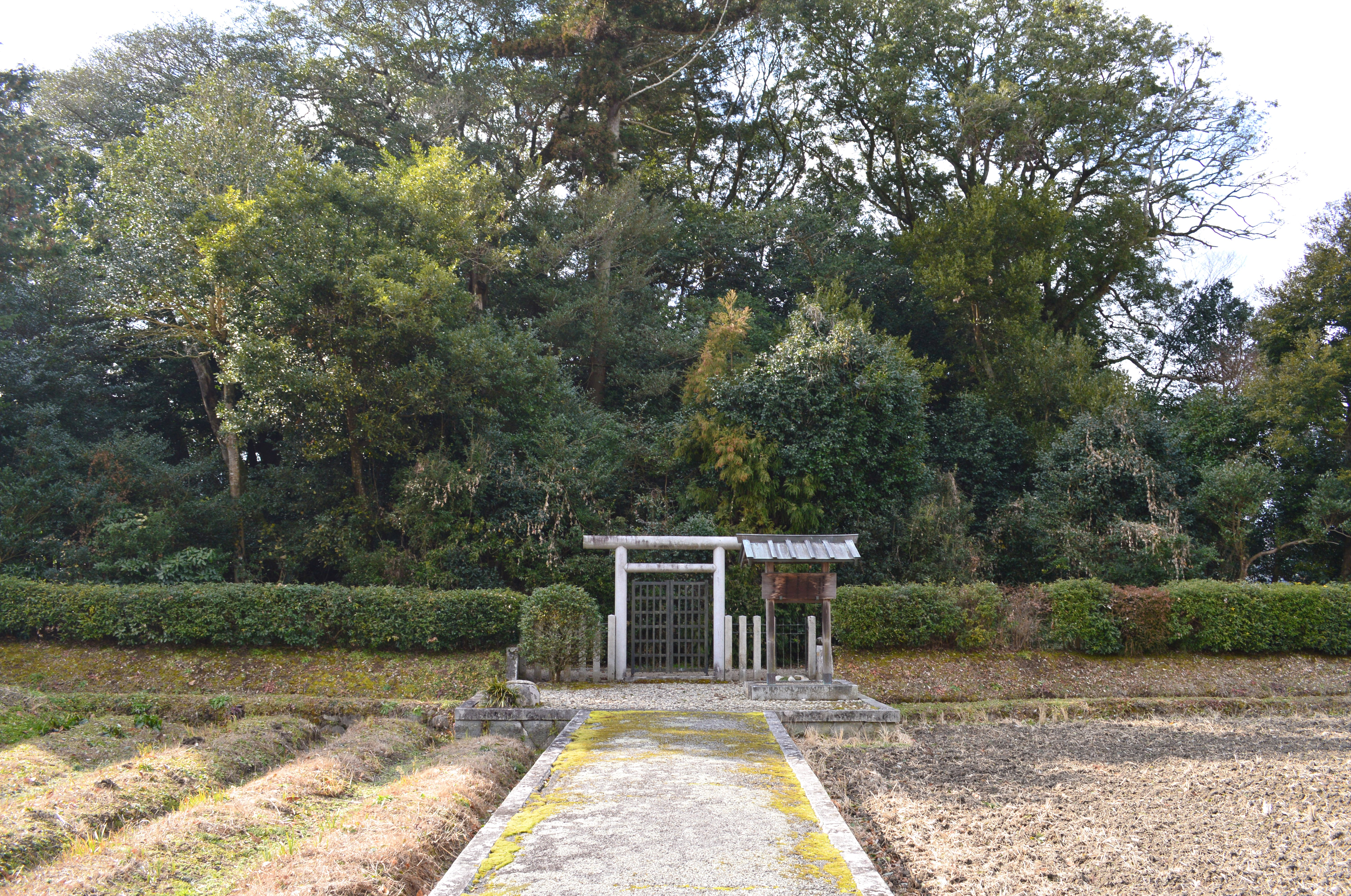 息速別命墓 拝所